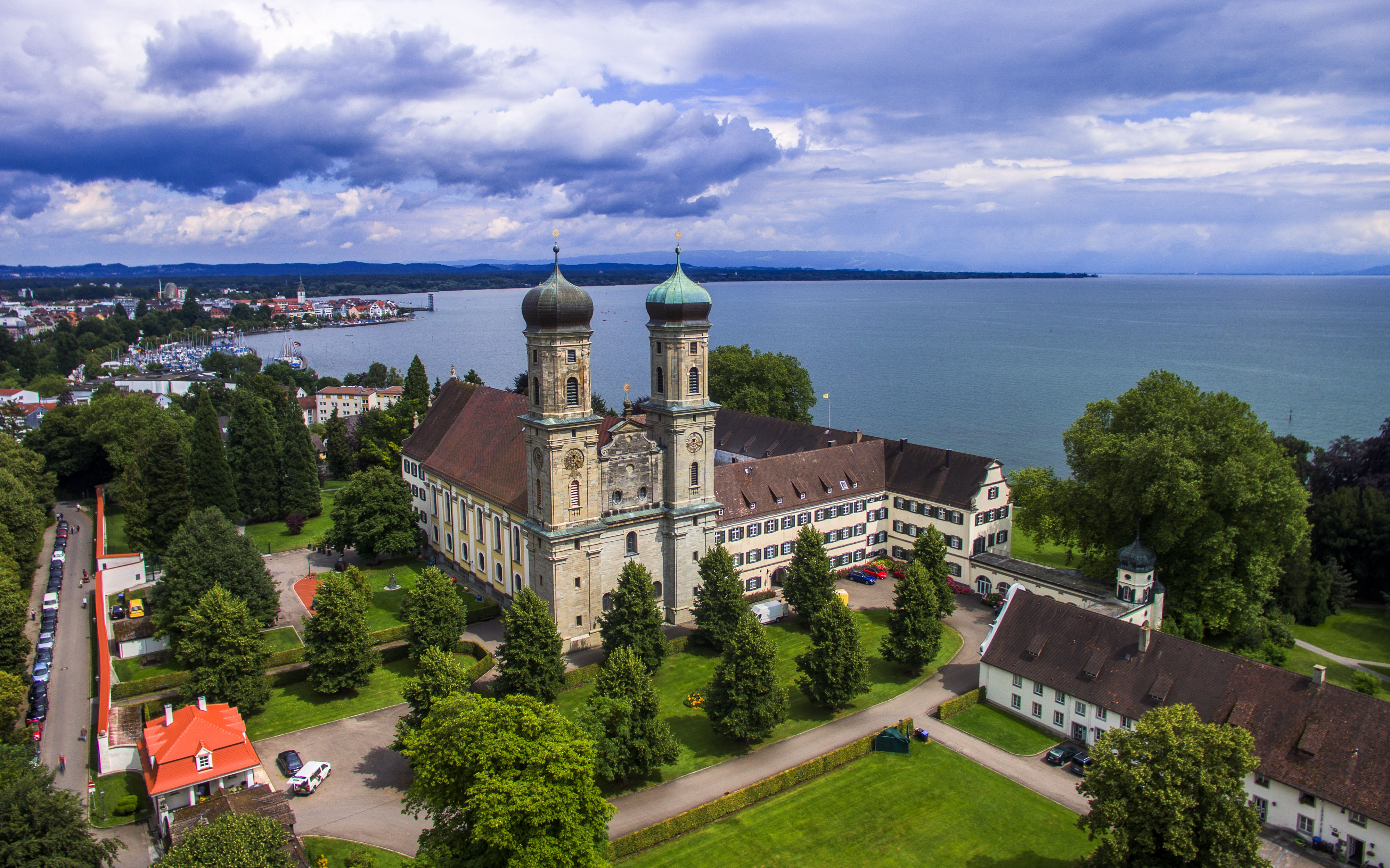 Schlosskirche